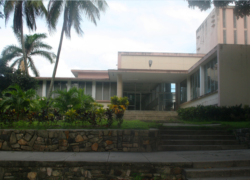 Biblioteca Central, Santa Clara, Cuba.